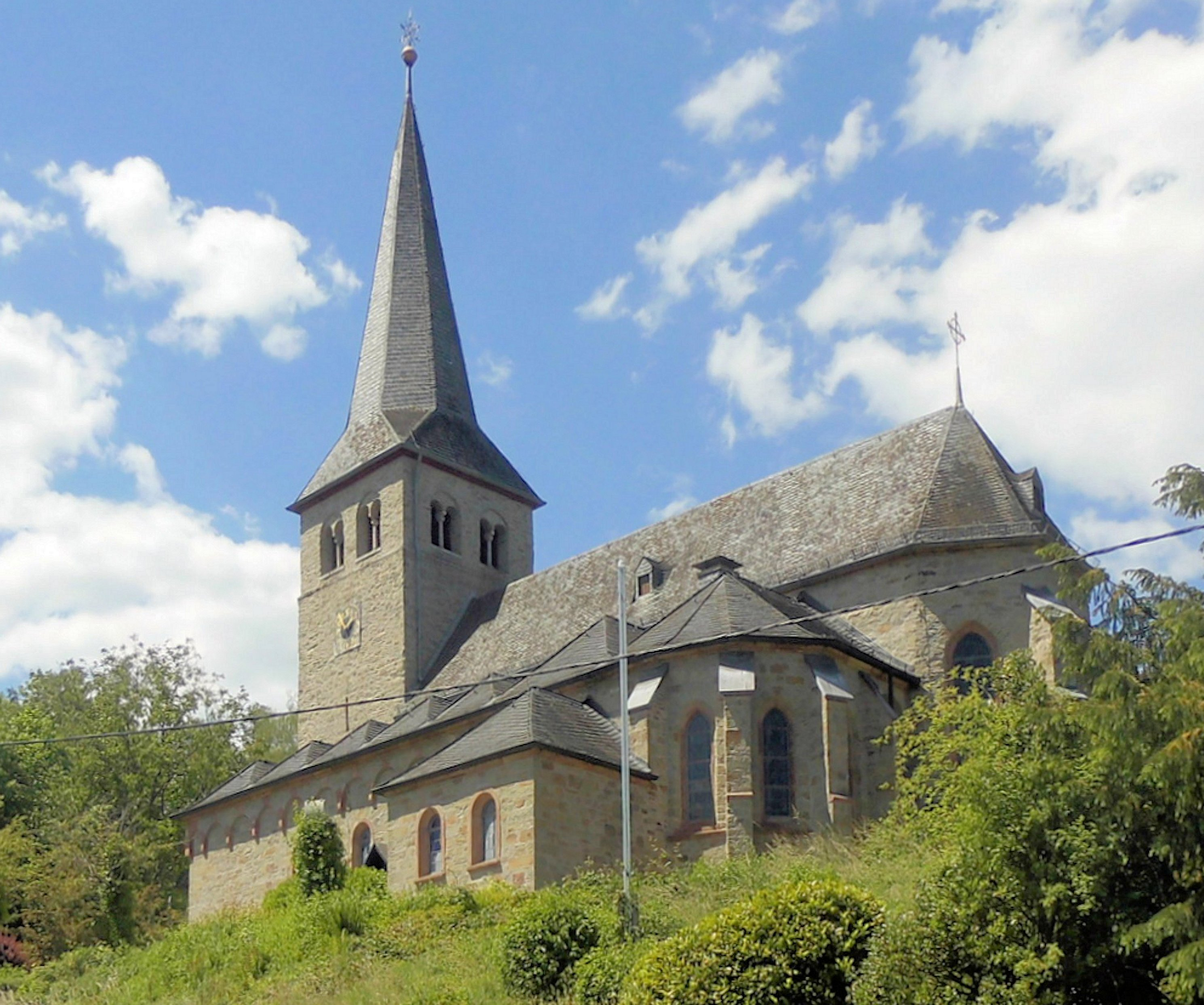 Südostseite der Kirche St. Peter in Herchen, Gemeinde Windeck, Rhein-Sieg-Kreis, Nordrhein-Westfalen